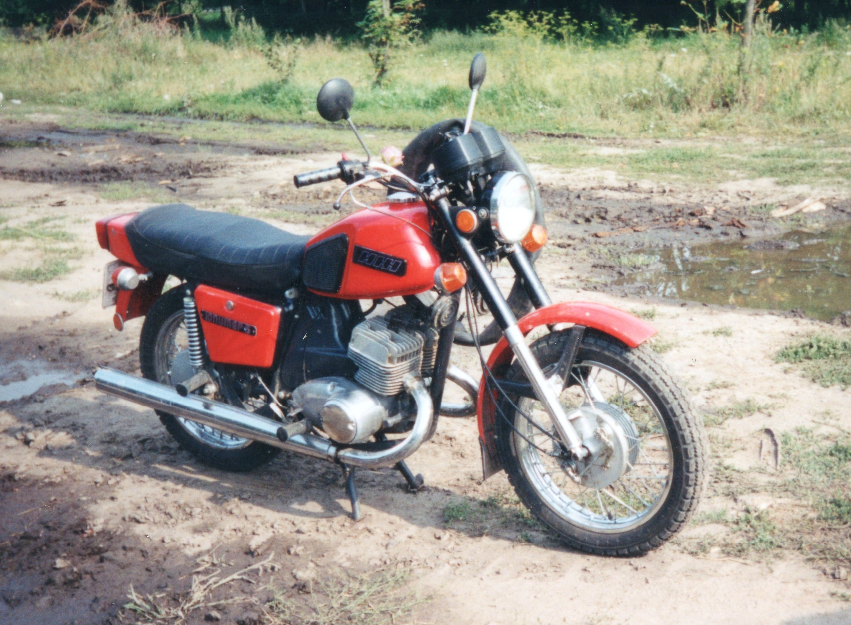 IZH Jupiter 5